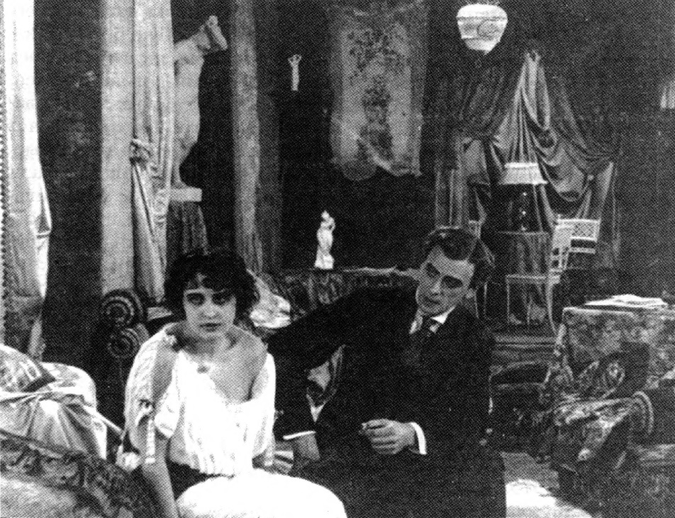 Актёры Вера Холодная и Витольд Полонский в фильме "Миражи" (1916), режиссёр Пётр Чардынин